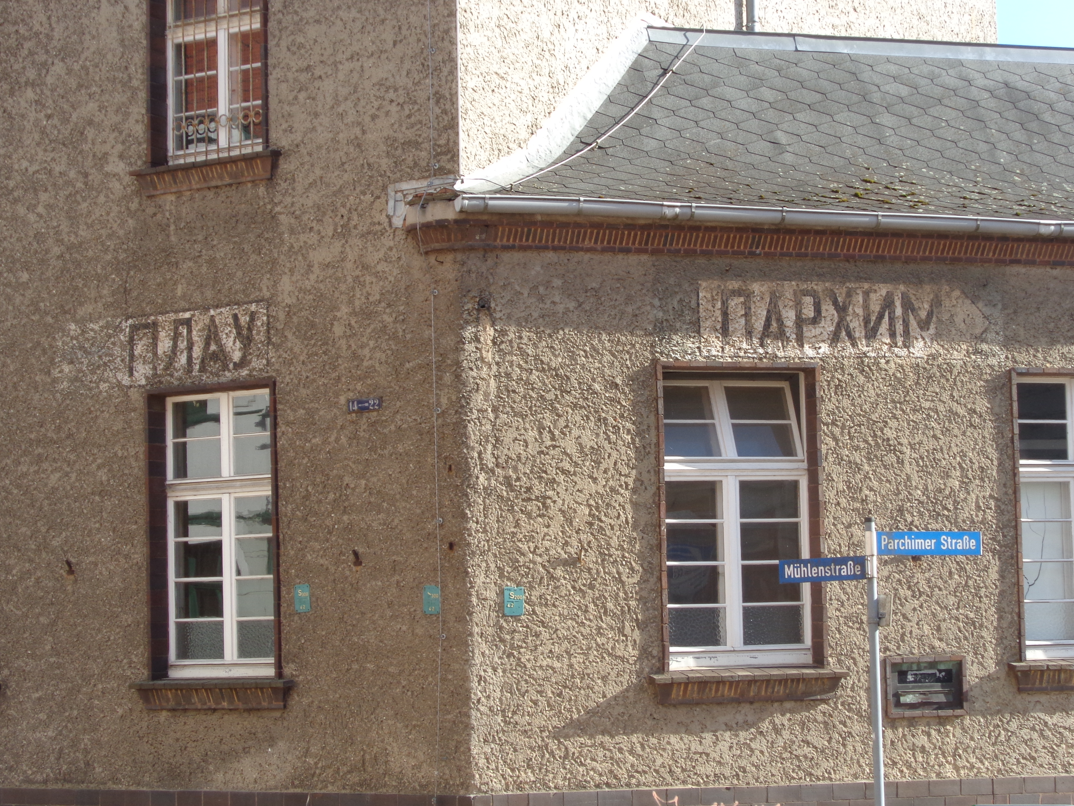 Früheres Postgebäude in Lübz mit russischen Wegweisern nach Plau und Parchim.